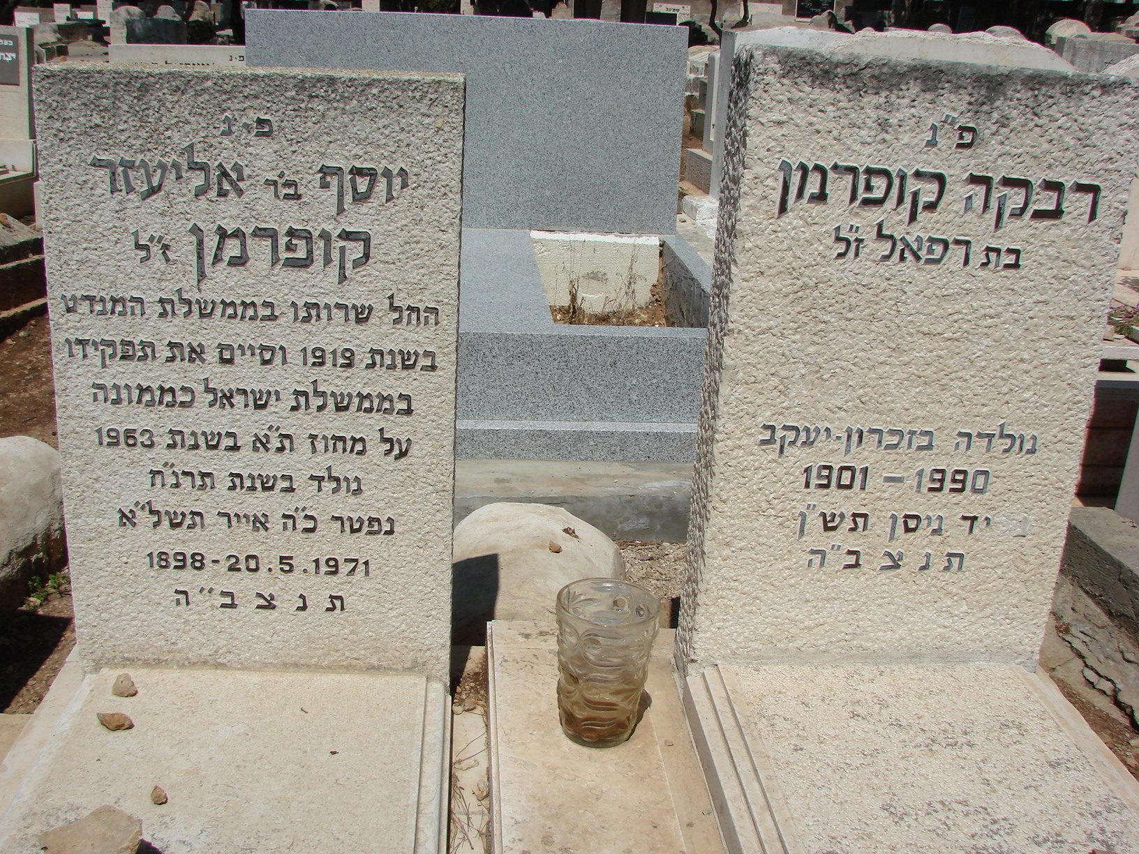 קיברם של רבקה יוסף קופרמן בבית הקברות של זכרון יעקב